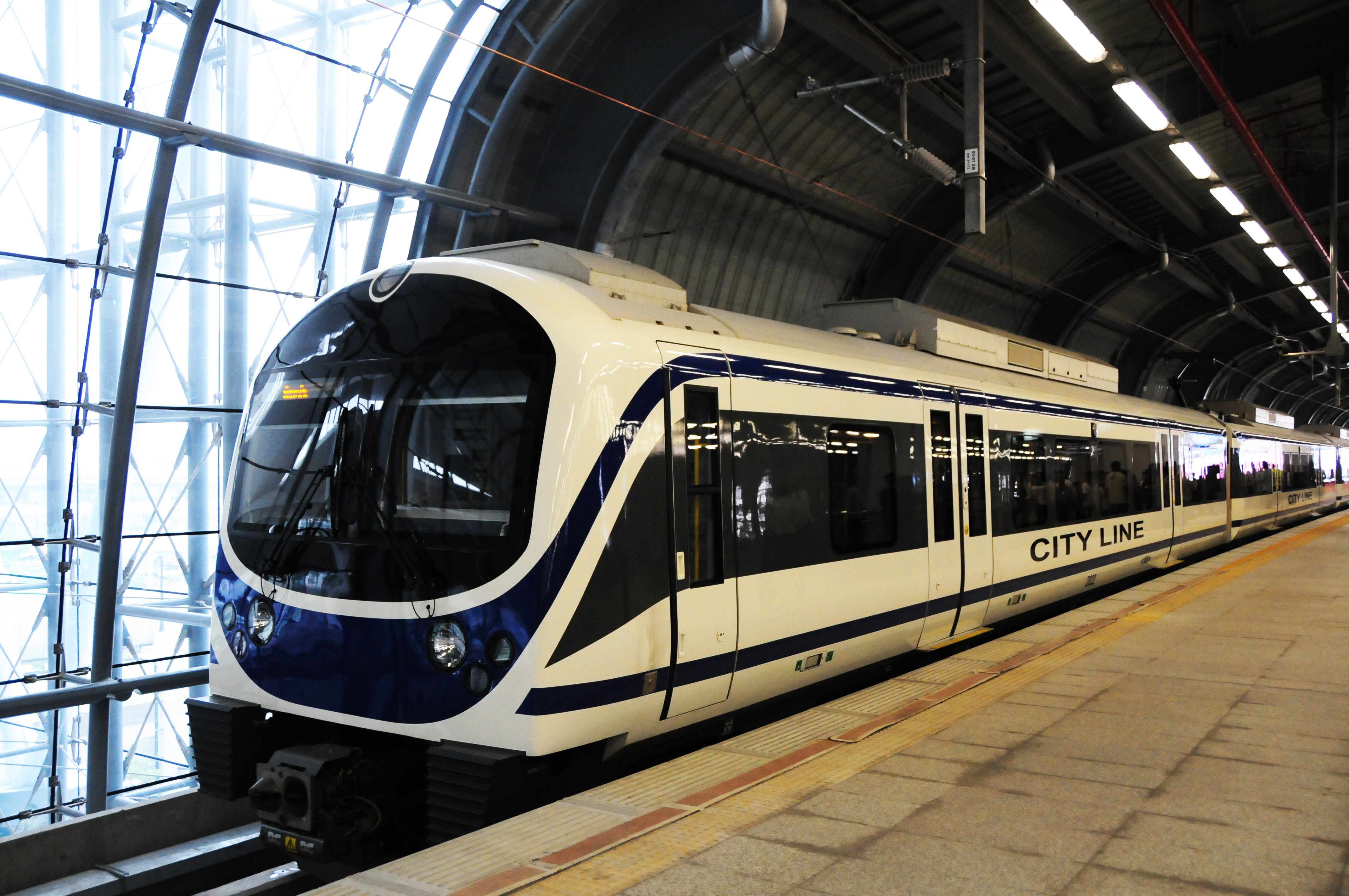 ชานชาลาที่ 1 สถานีมักกะสัน